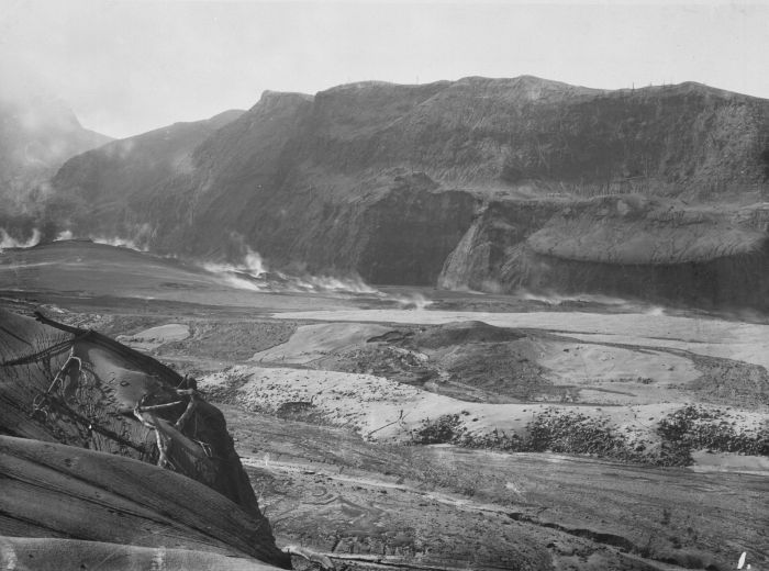 Foto. Oost-Java, kraters in de lahar Badak, vulkaan Goenoeng Keloed